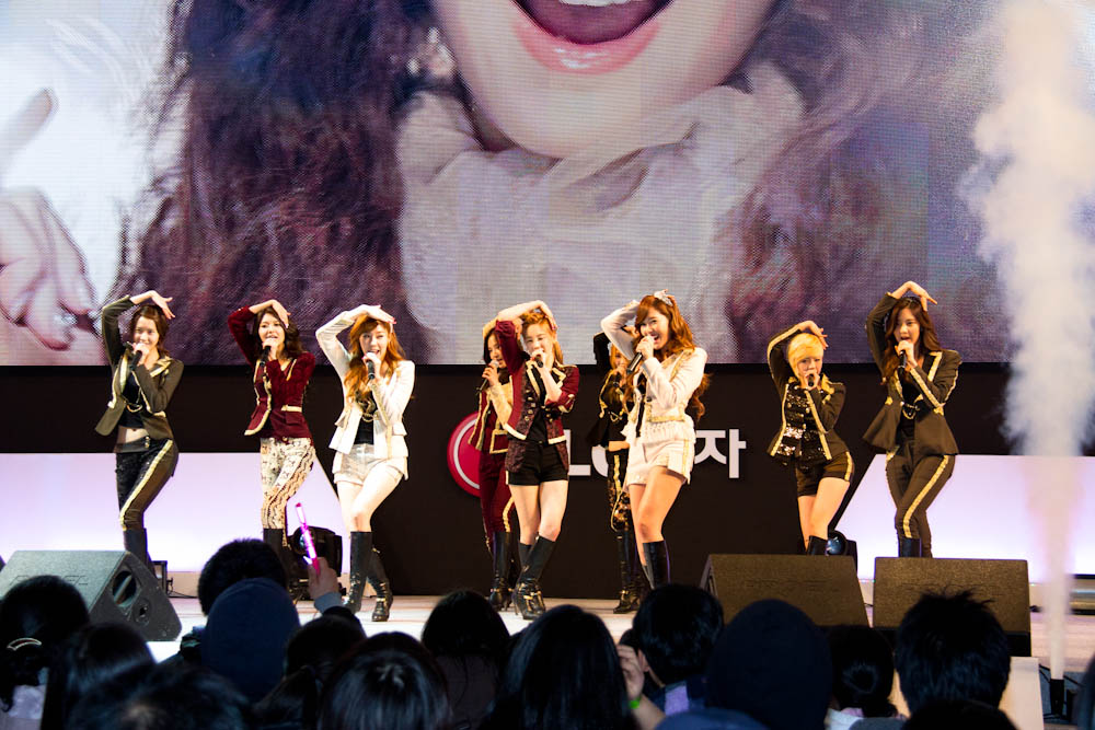 Lg전자가 3월 31일, 4월 1일 양일간 서울 잠실동 롯데월드 아이스링크에서 'lg 시네마3d 월드페스티벌'을 성황리에 개최했다. ※ LG전자 뉴스룸 에서 관련 보도자료를 확인실 수 있습니다.